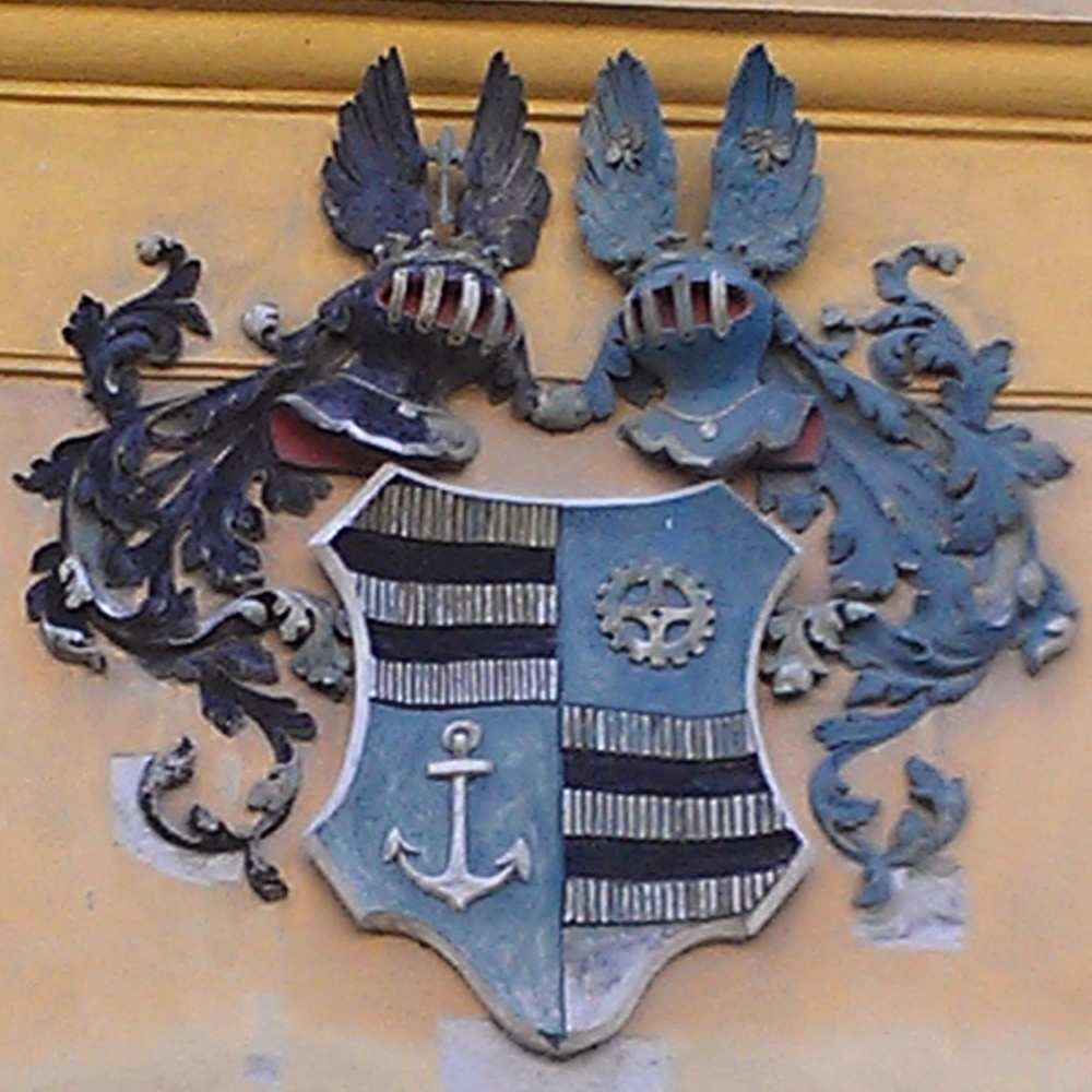 Erb rodiny Schoeller na kostole Sv. Michala, Levice